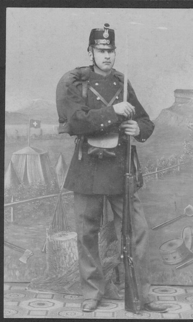 Fusilier du bataillon 20 de Genève. Il est armé d'un fusil Vetterli 1881. Uniforme de l'ordonnance de 1875. Shako ordonnance 1888. Giberne modèle de 1868. Photographe Olsommer, escalier de la Gare à Neuchâtel.